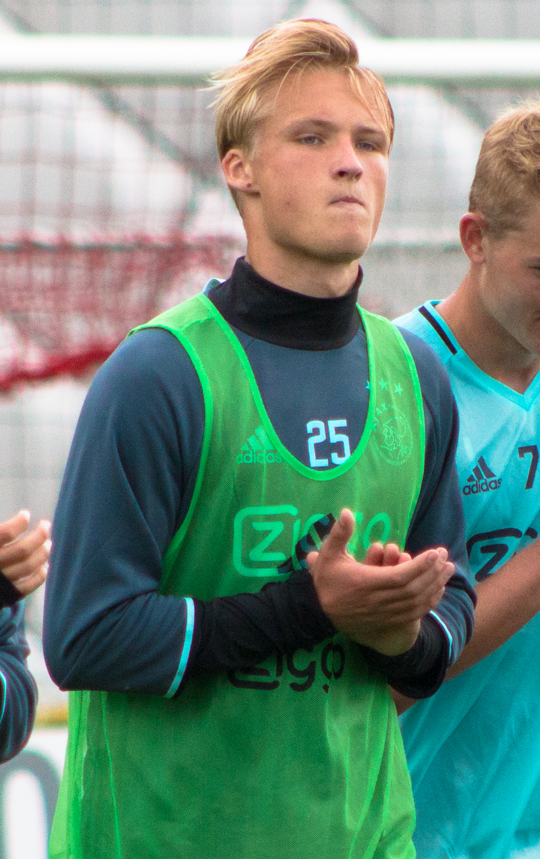 Ajax Open Training